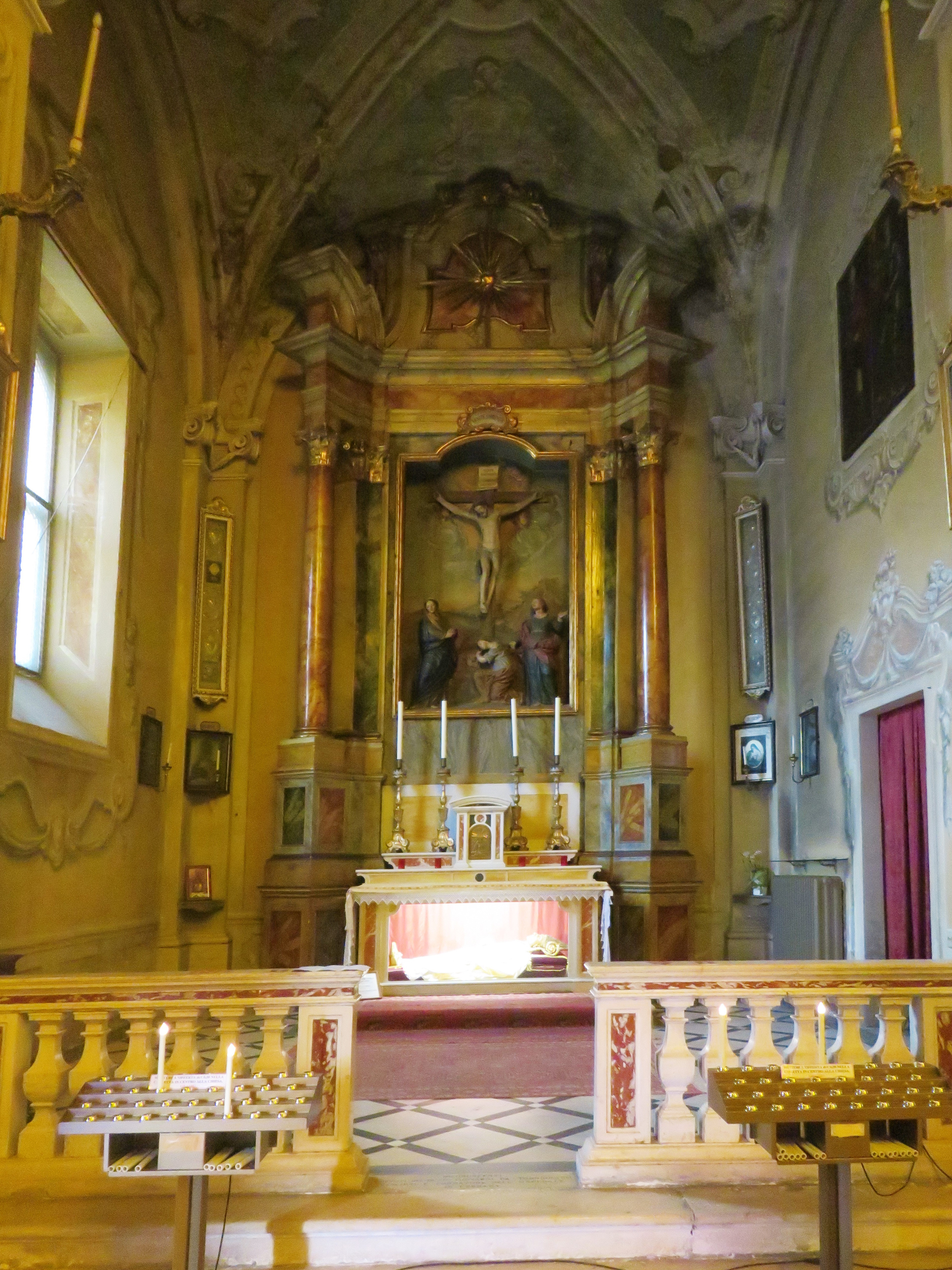 Chiesa di San Girolamo a Ferrara. Interno